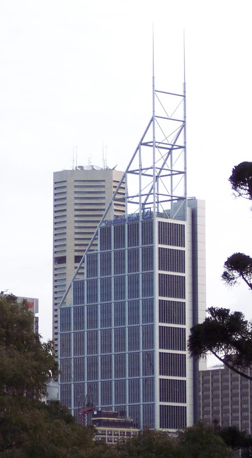 Deutsche bank place